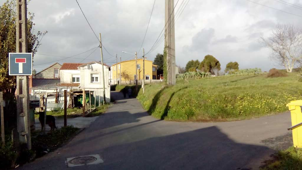 Vista do Coto, Ferrol.